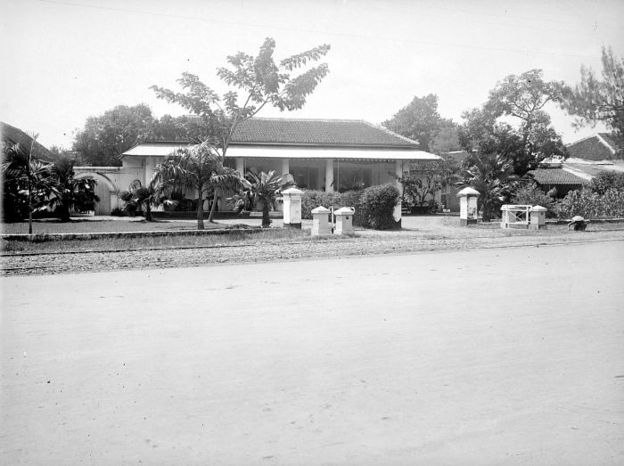 Negatief. Een villa die door een muur in twee woningen is gesplitst, Bodjong, Semarang